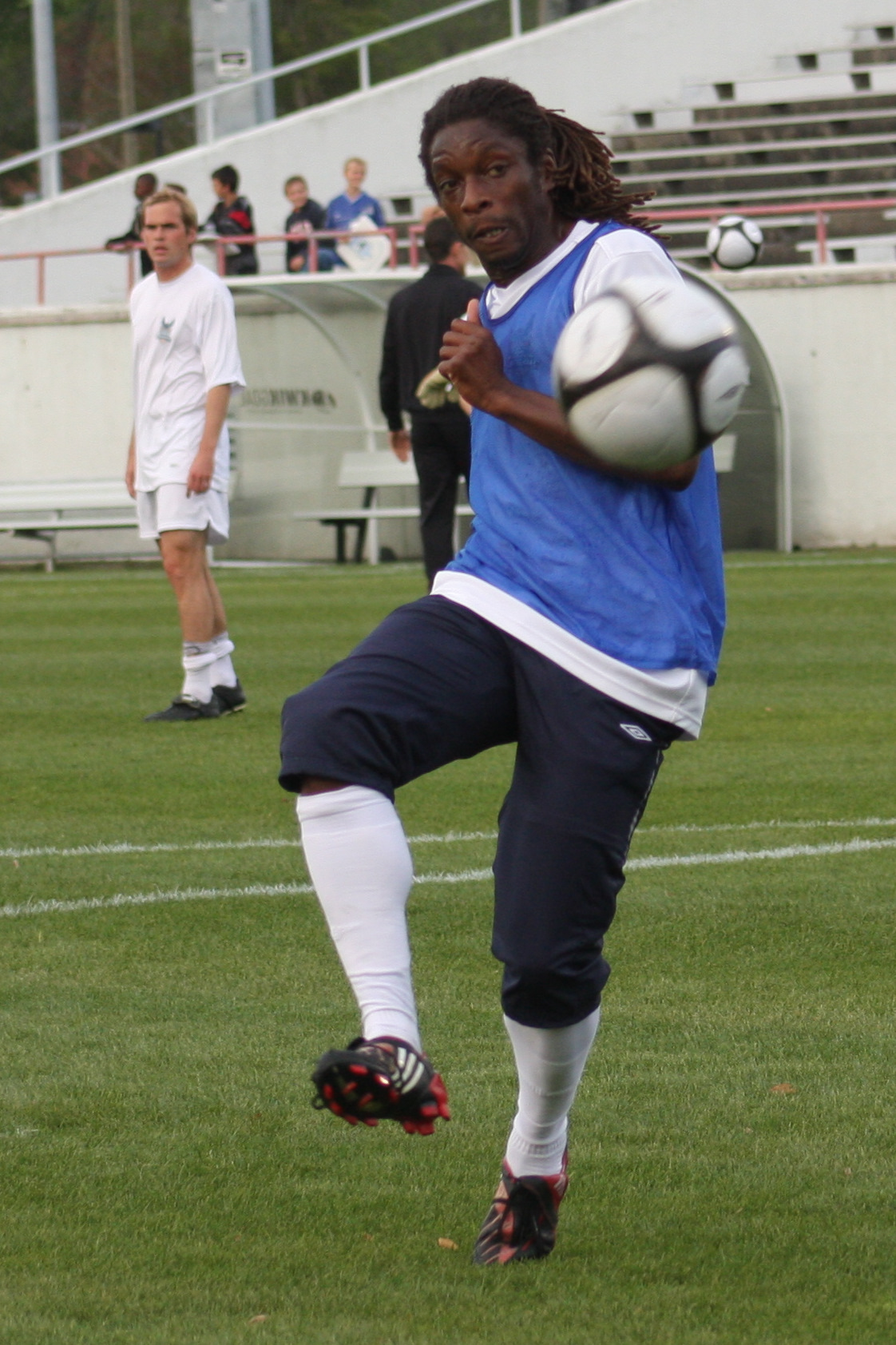 Gavin Glinton